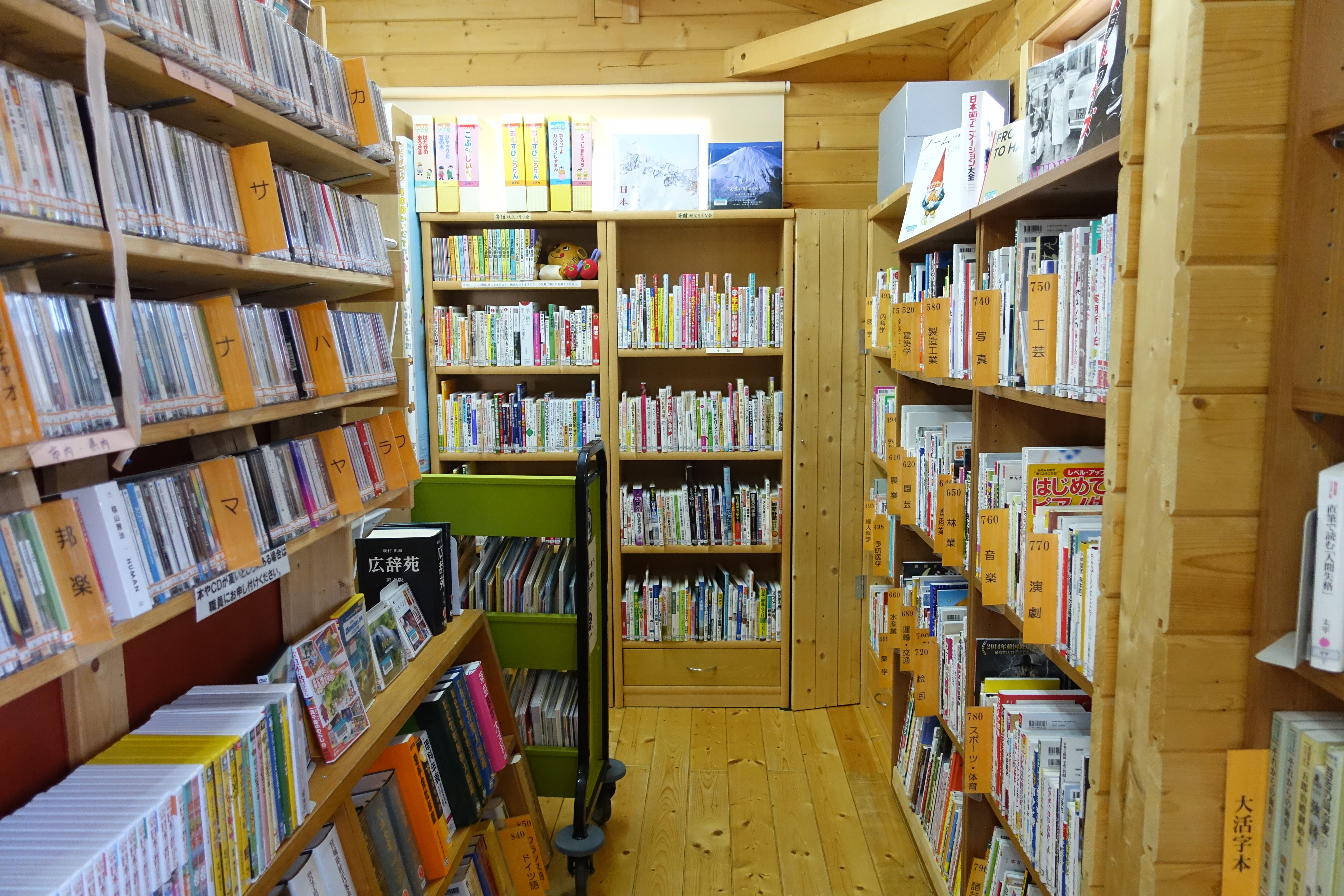 2012年12月から仮設館（ログハウス）で開館している陸前高田市立図書館の館内。